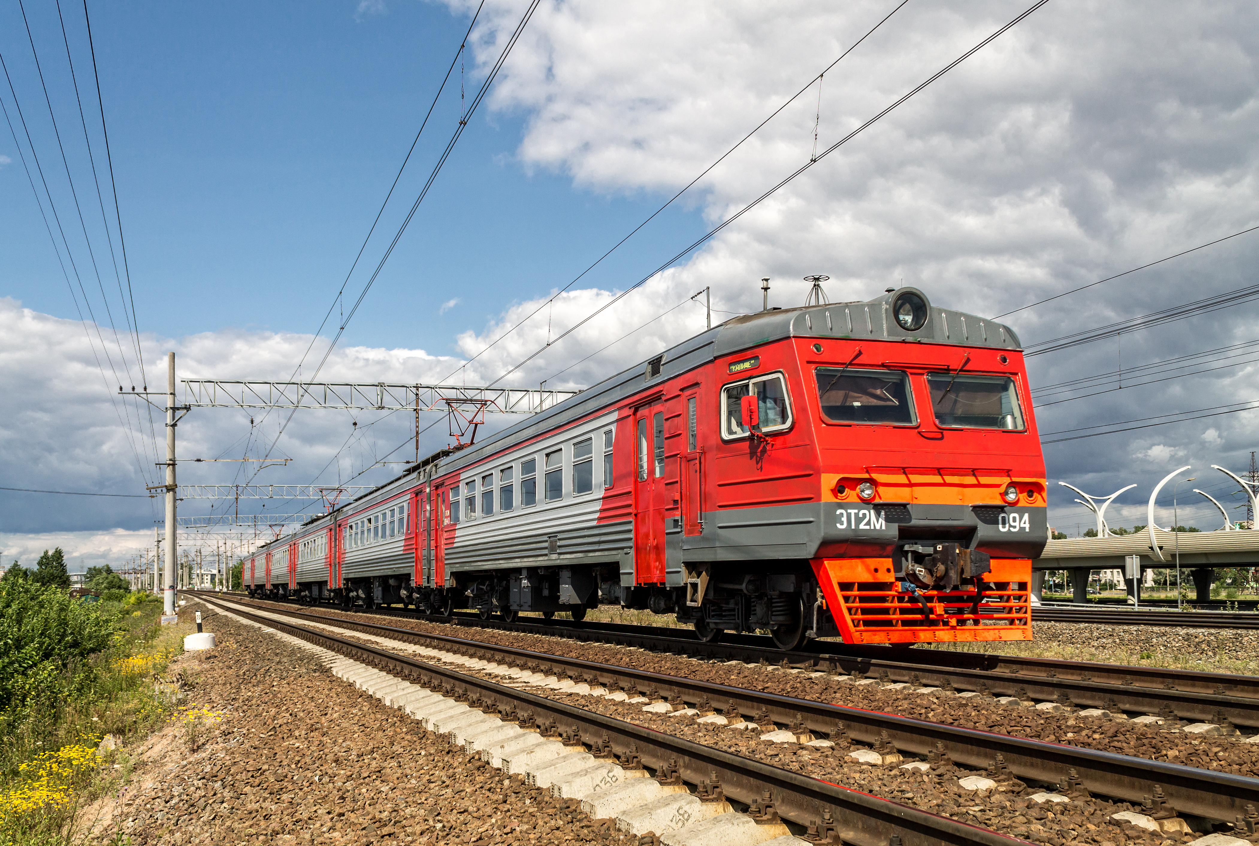 ЭТ2М-094, Лигово - Броневая см. фото в альбоме автора